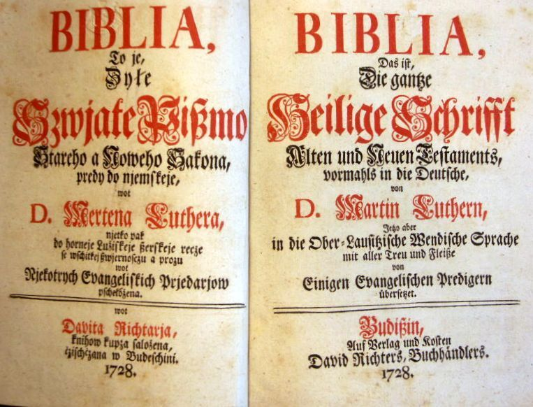 zweisprachiges Deckblatt der ersten vollständigen Bibelübersetzung in obersorbischer Sprache aus dem Jahr 1728; links Sorbisch, rechts Deutsch Hornjoserbsce: Dwurěčne titulne łopjeno prěnjeho dospołneho přełožka Biblije do hornjoserbšćiny z lěta 1728; naprawo serbsce, nalěwo němsce